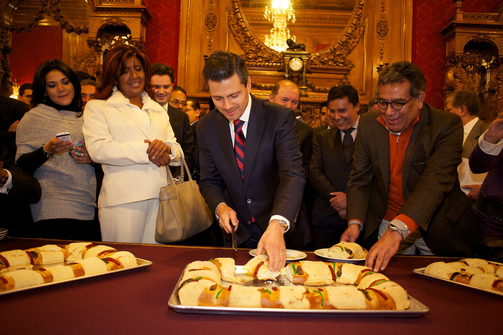 Reunión con Prensa. Rosca de Reyes.